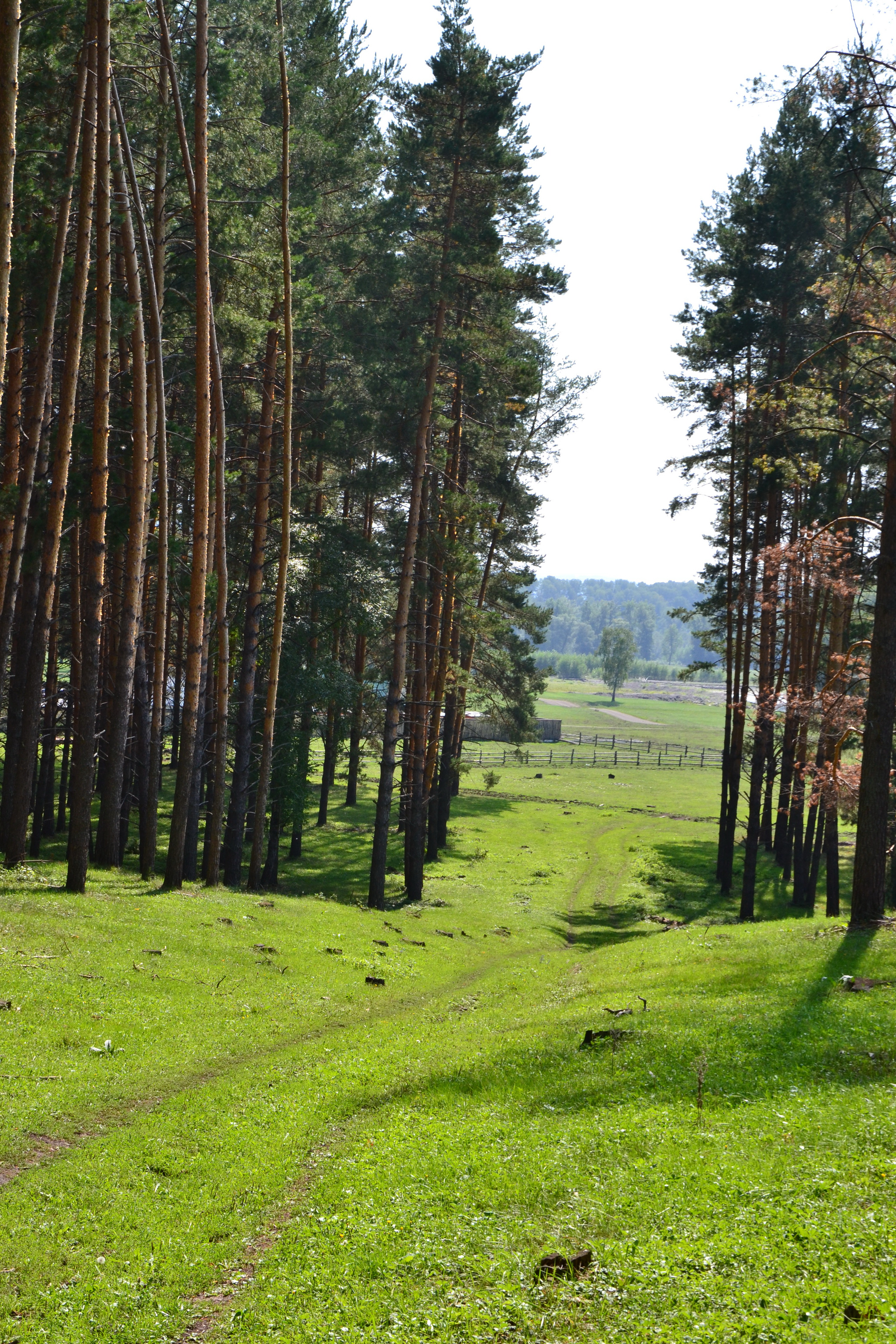 Мурадымовское ущелье, Бурзянский район This image is related to the protected area of Russia number 0210102